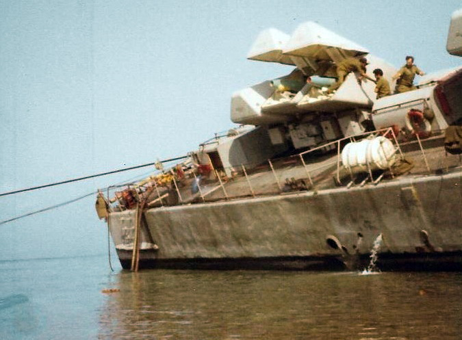 פירוק מרעומים מהטילים באח"י געש על השרטון לפני העברתם במסוק